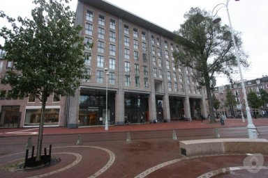 gevel OBA Javaplein, Amsterdam